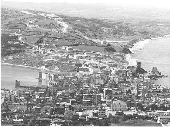 1972-73 yılları arasında Sinop Amerikan Radar Üssü'nde görev yapan radar personeli James Bedner'ın görevi sırasında çektiği Sinop fotoğrafı.